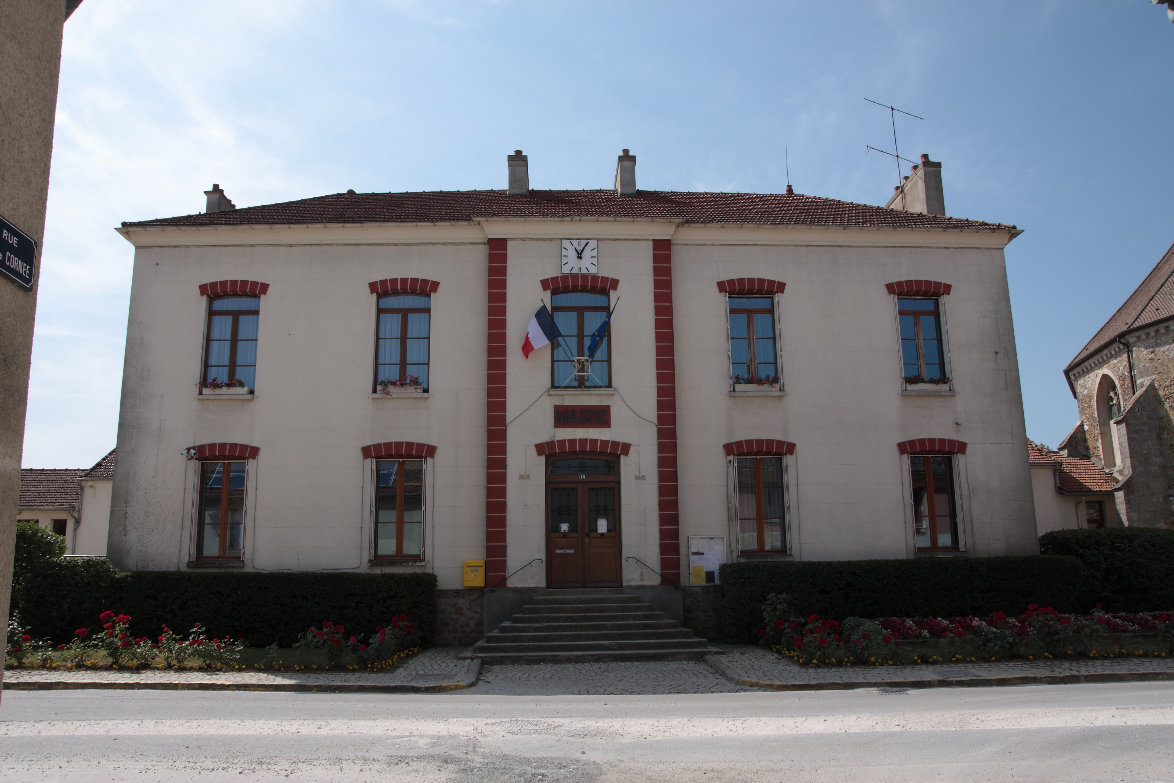 Mairie de Saint-Rémy-la-Vanne (77)